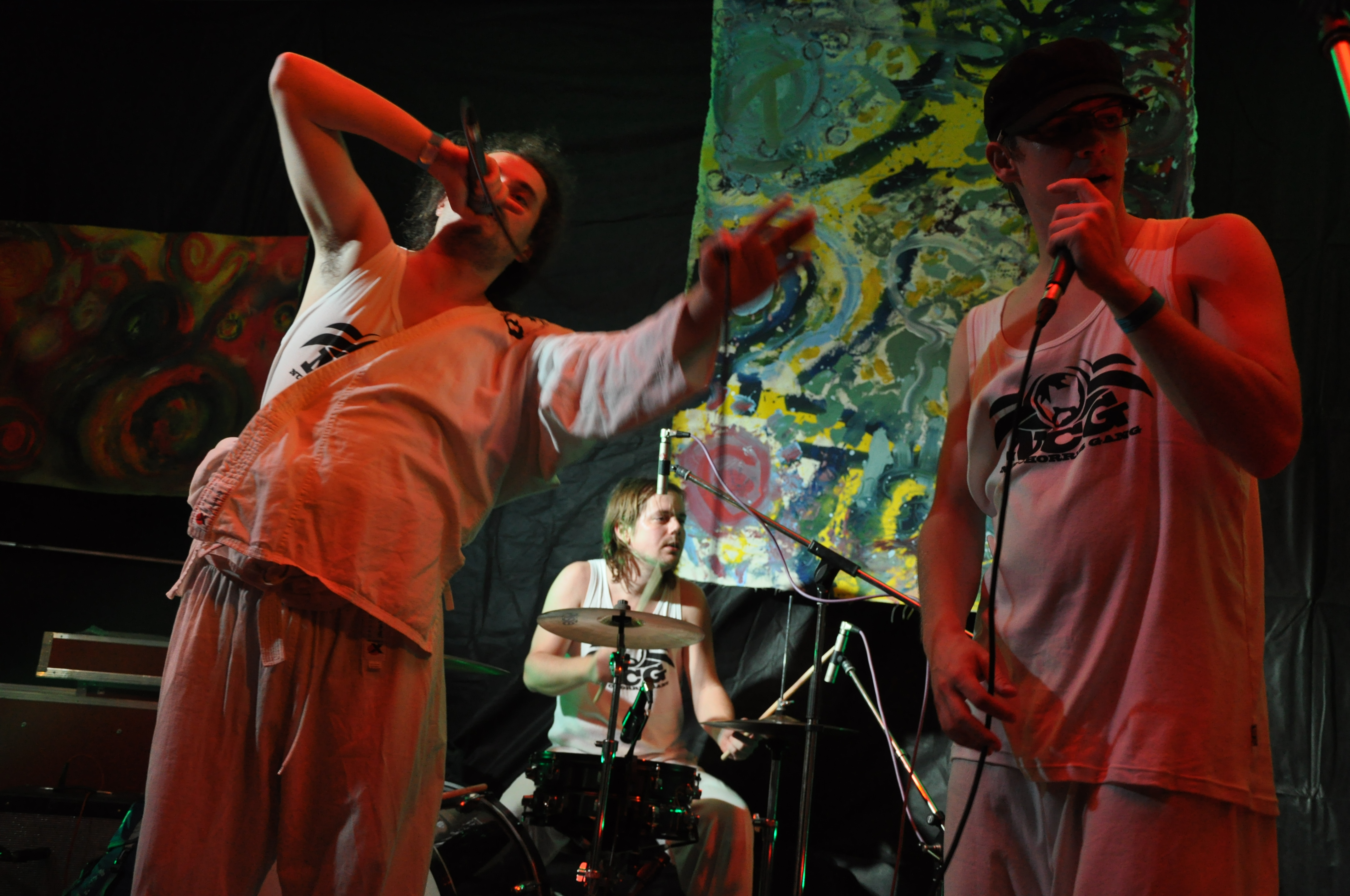 Skupina Nuck Chorris Gang na festivalu Daňkovický bigbít 12. prosince 2009